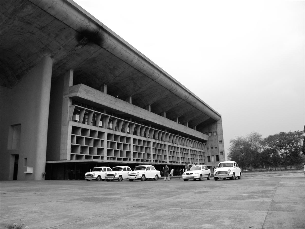 Palais de Justice de Chandigarh, Inde.